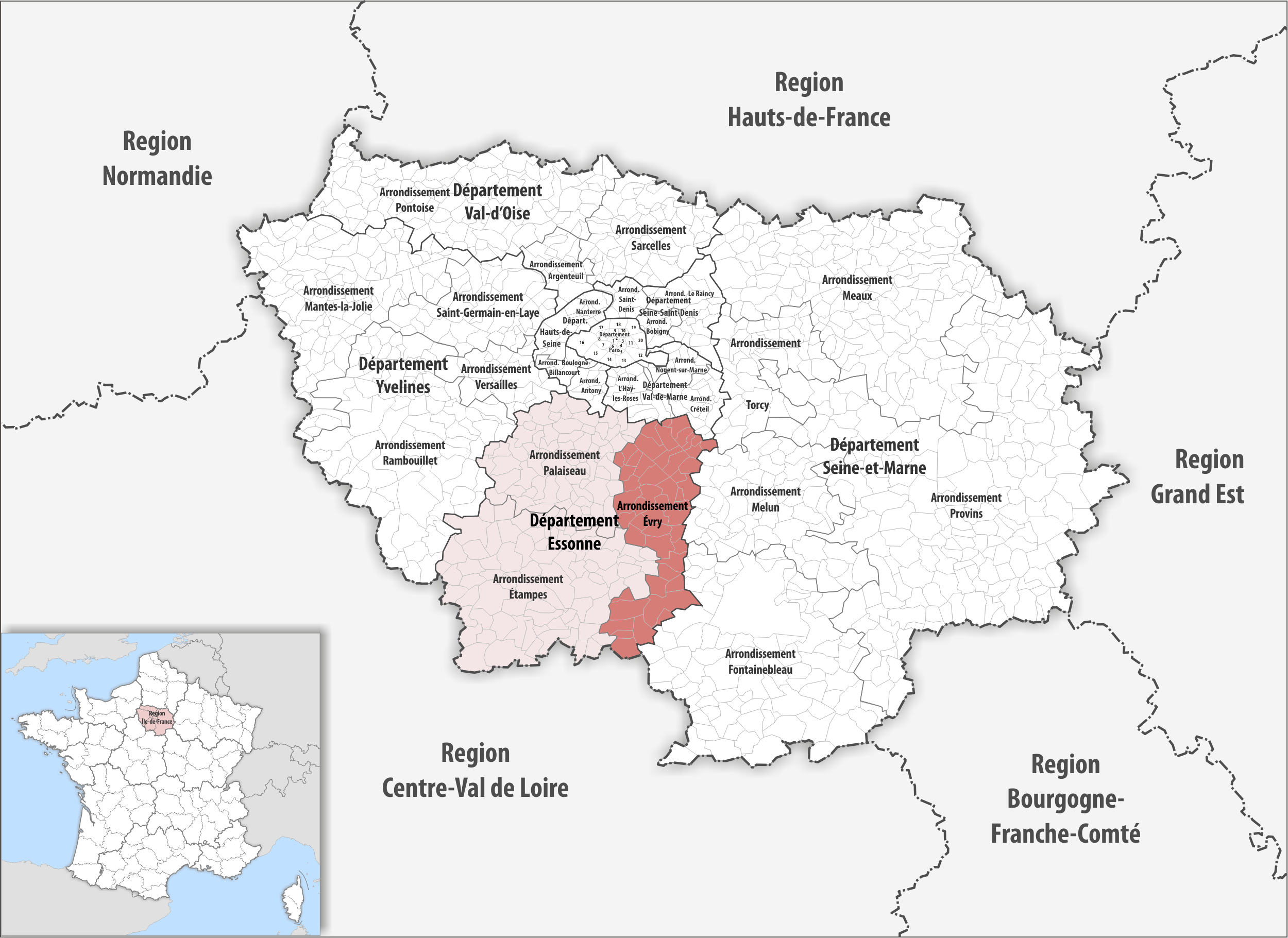 Lage des Arrondissements Évry